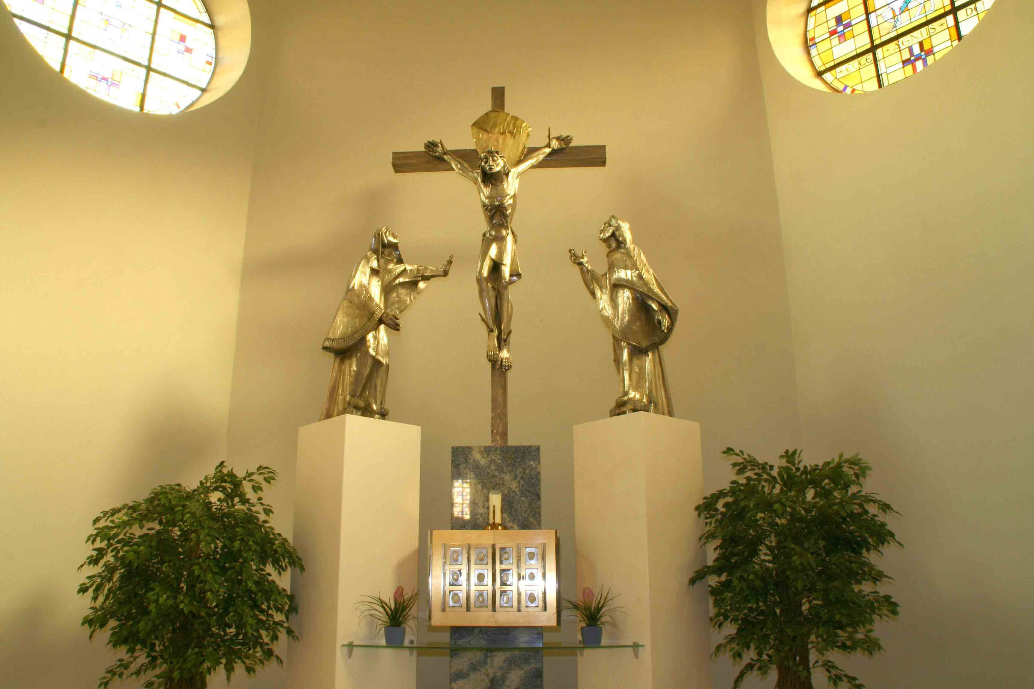 Rolleng Kierch